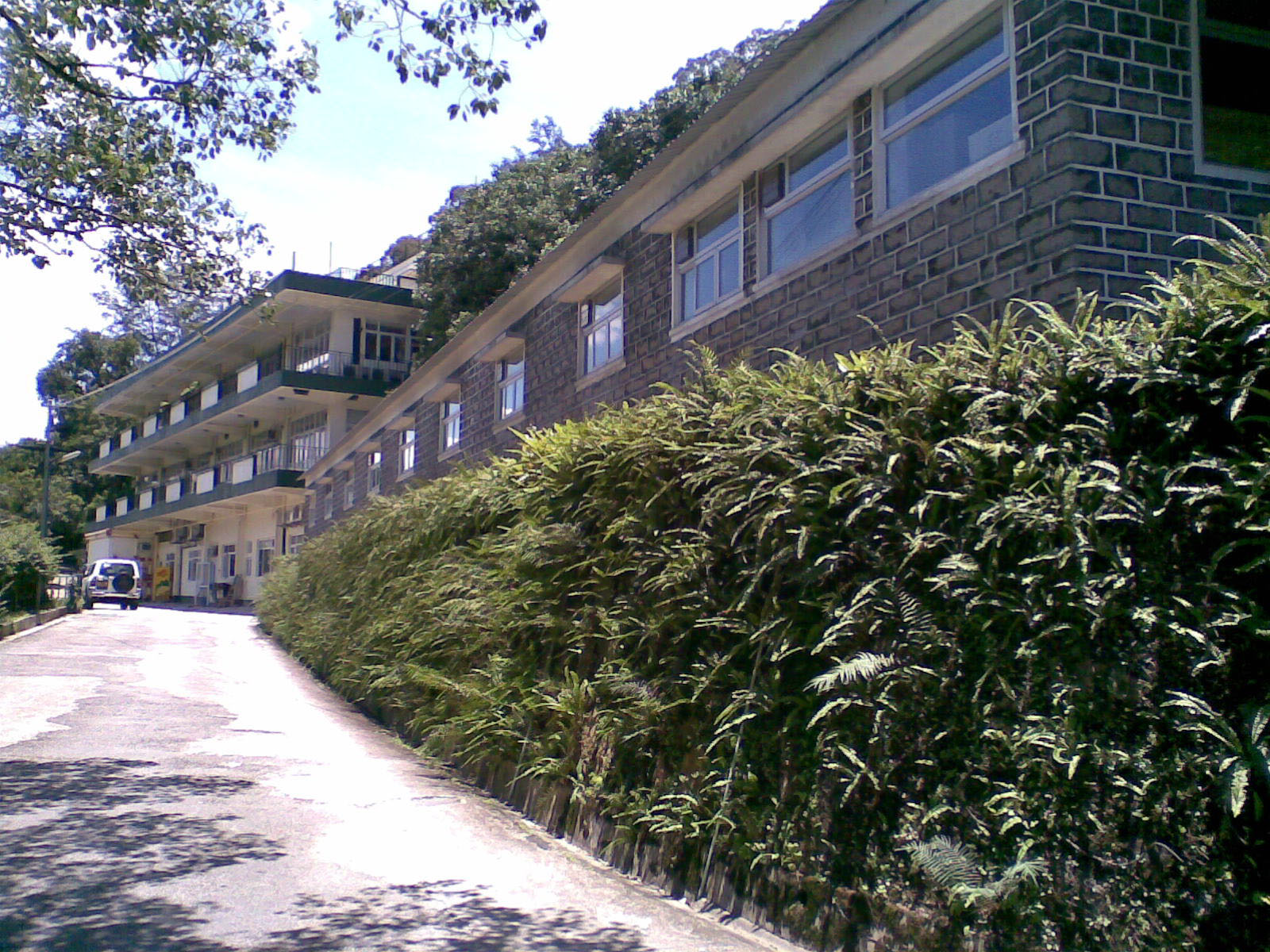 中文（香港）: 嘉道理農場暨植物園保肓大樓及辦公室